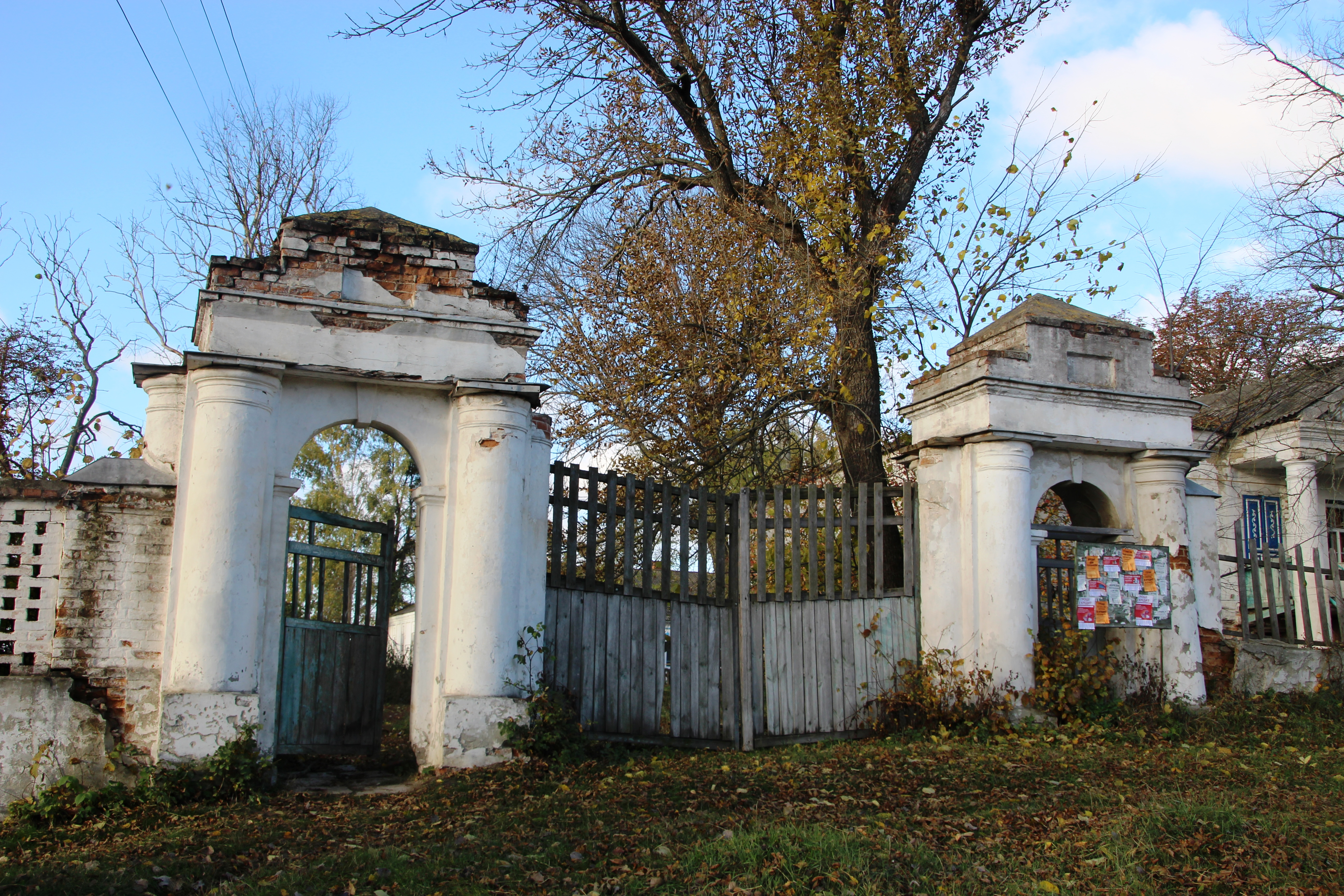 Огорожа і в'їзна брама (мур.), село Михайлівка, вул. Трихліба